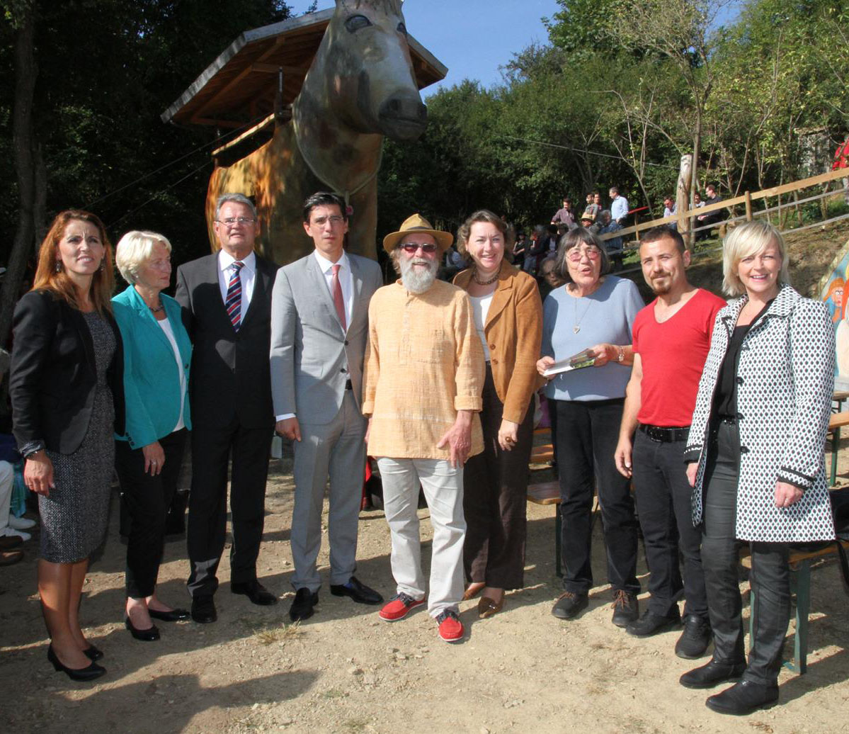 Gruppenfoto anläßlich Symposion Honerath 2016